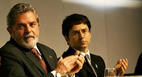 São Paulo - Presidente Lula participa da comemoração dos 5 anos do jornal Valor Econômico com Luís Frias. (Foto Ricardo Stuckert/PR)